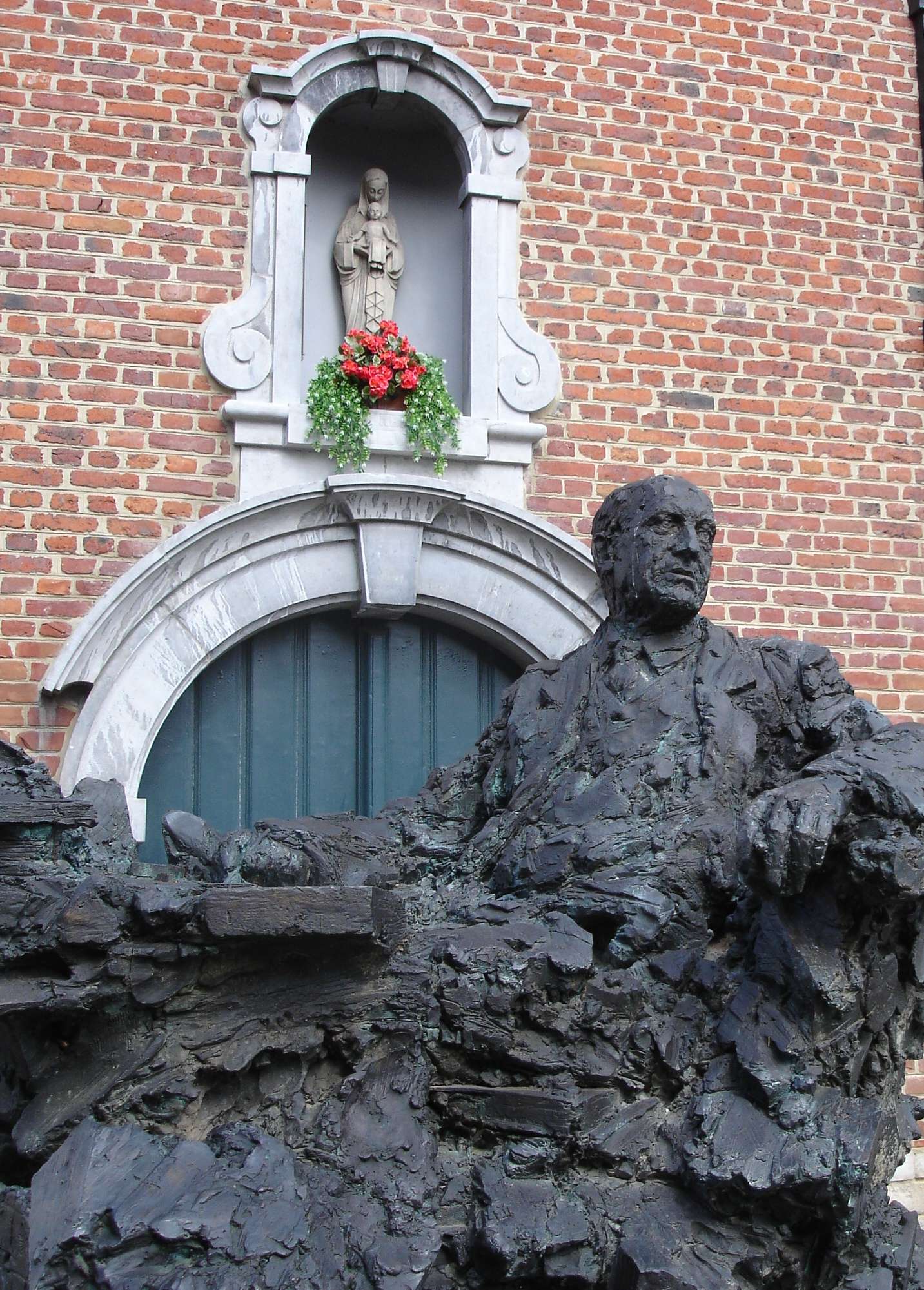 Anton van Wilderode door Wilfried Pas/12 december 1998. Kunst in de stad